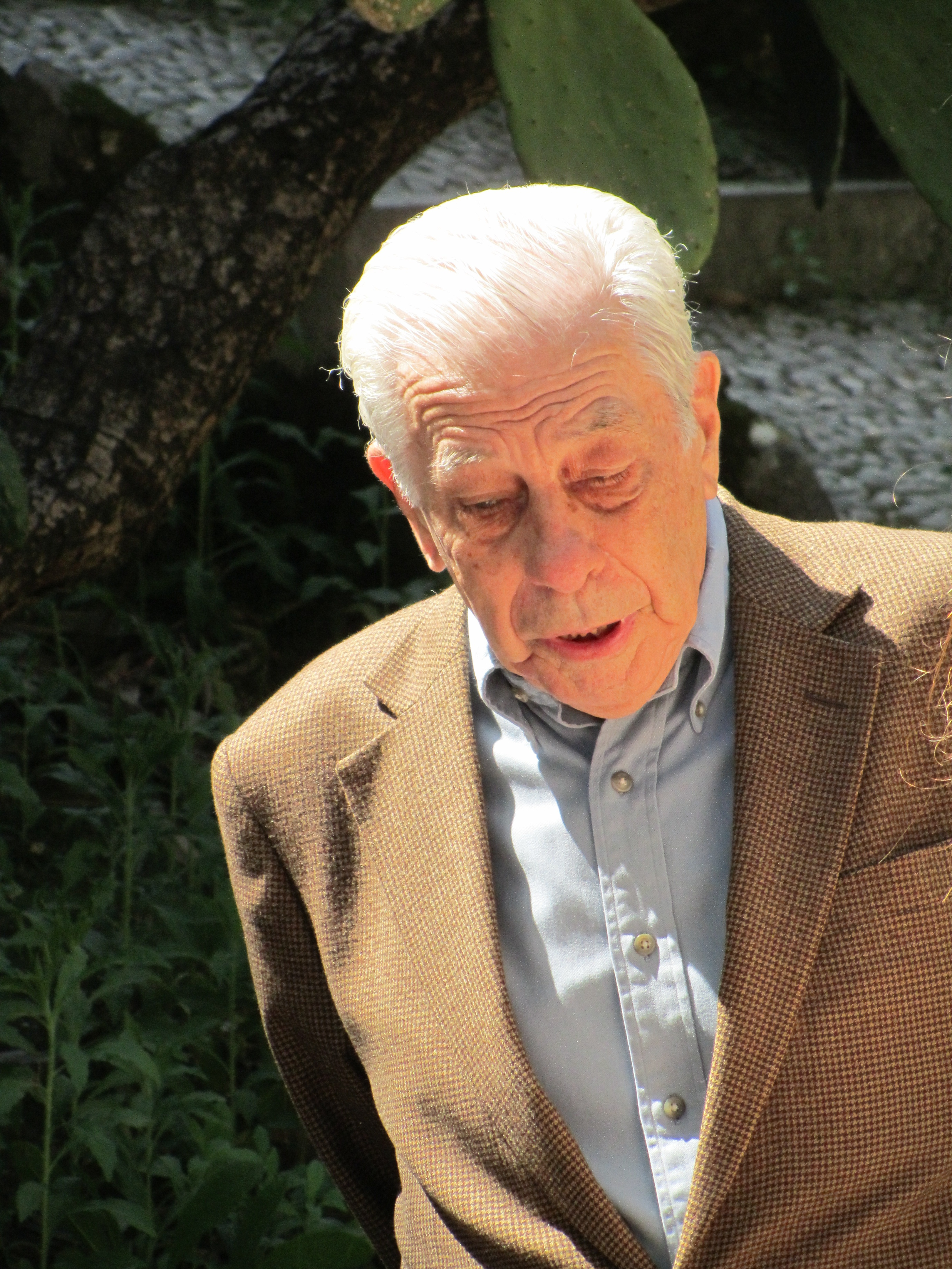 Professor Gonçalo Ribeiro Telles